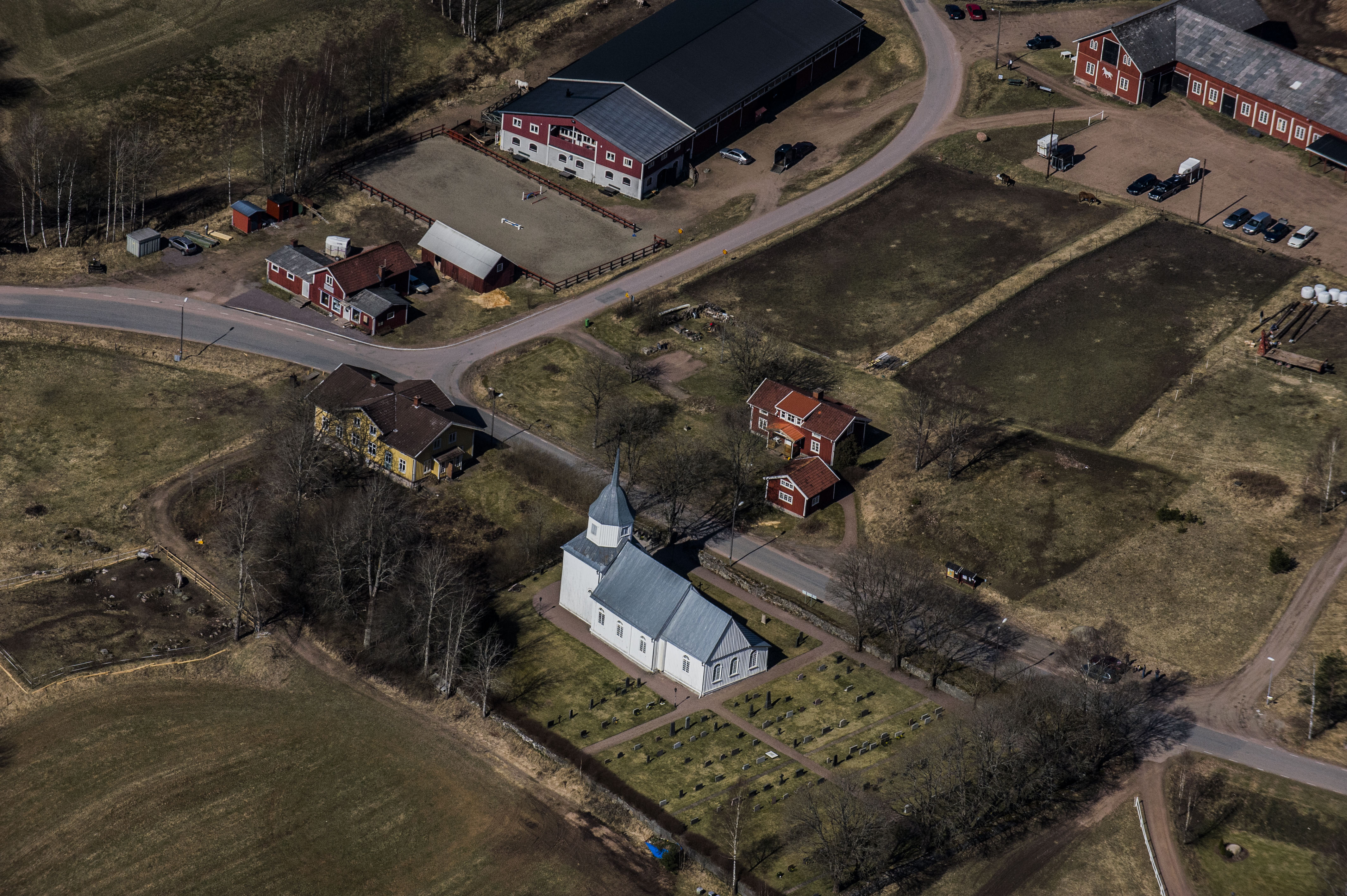 Öreryds kyrka från luften